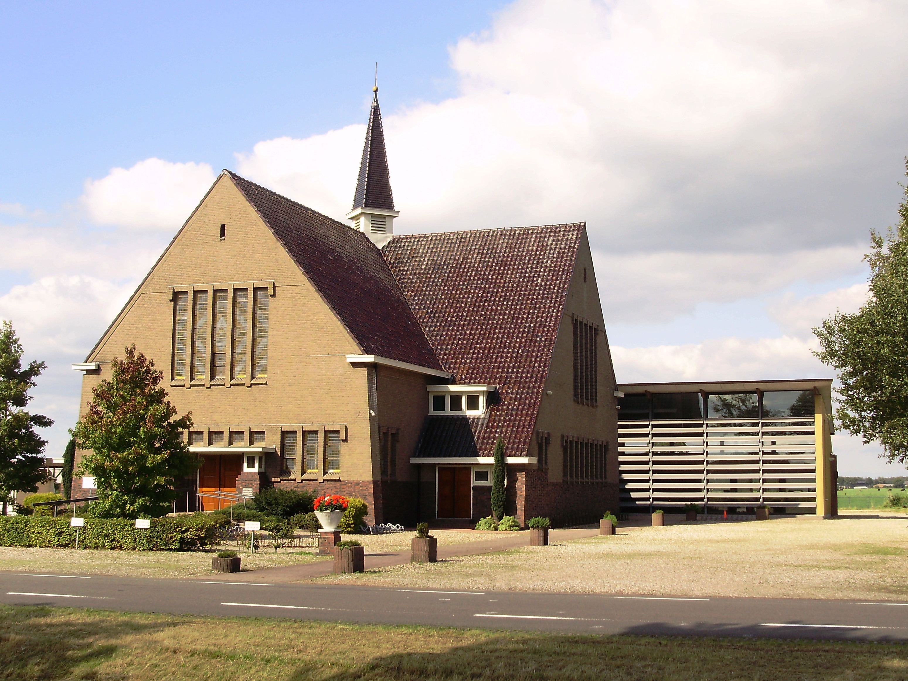 De Gereformeerde kerk in Haulerwijk, provincie Friesland